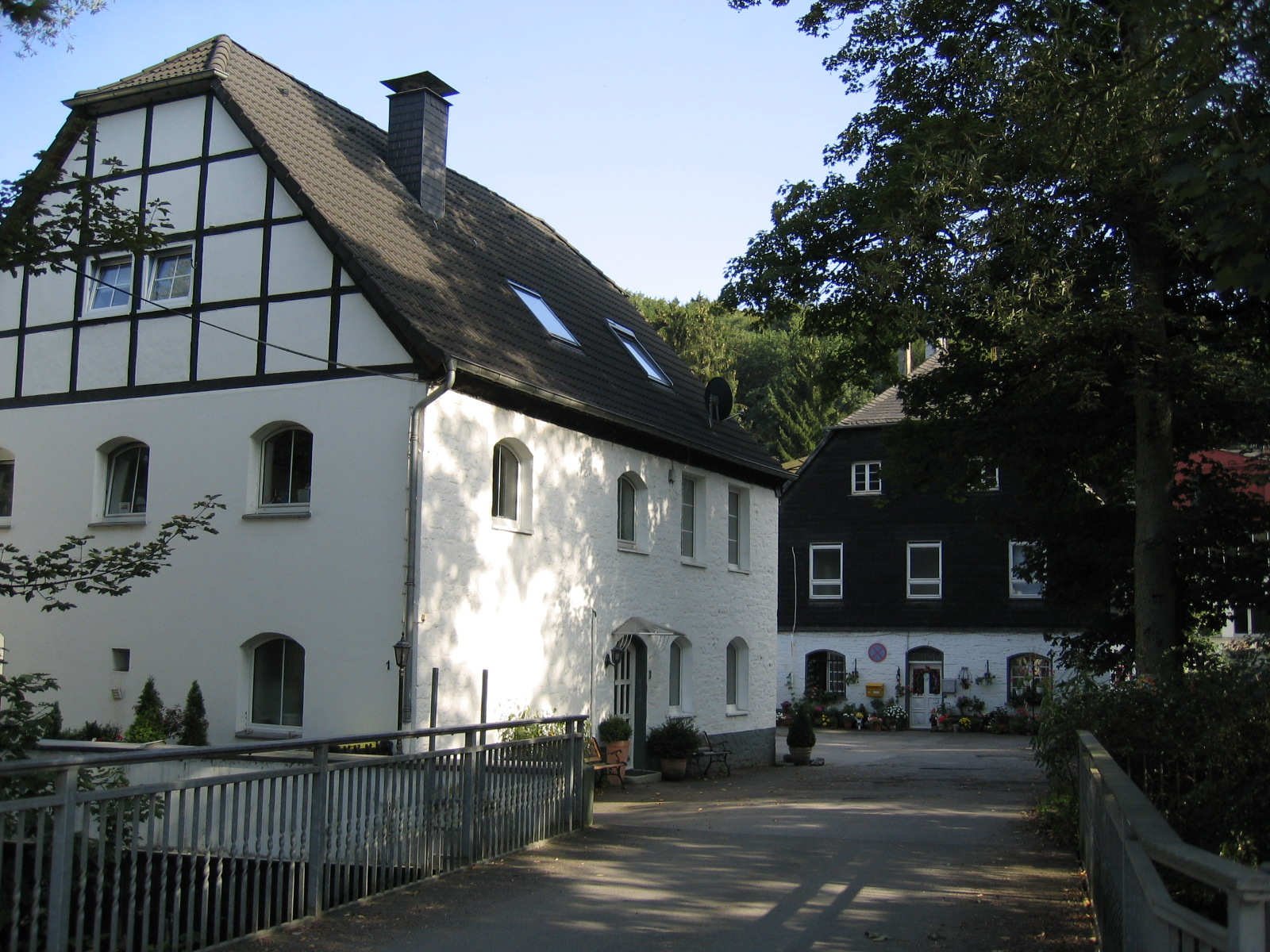 Piepenstockplatz in Hemer-Becke. Caspar Diedrich Piepenstock (1756-1821), Industrieller aus Iserlohn, gründete 1814 an dieser Stelle ein Messingwerk.